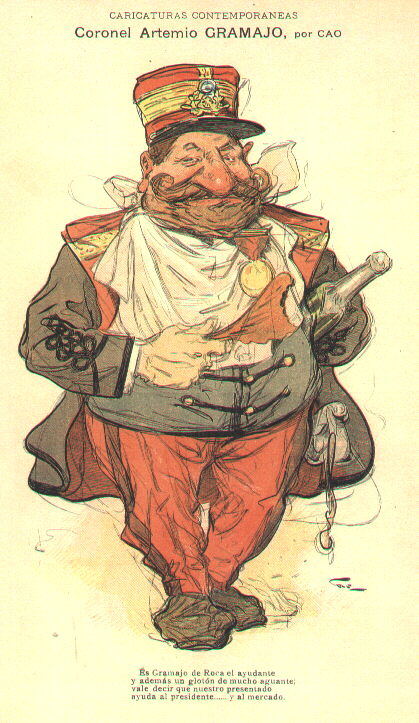 Caricatura de Cao Luaces